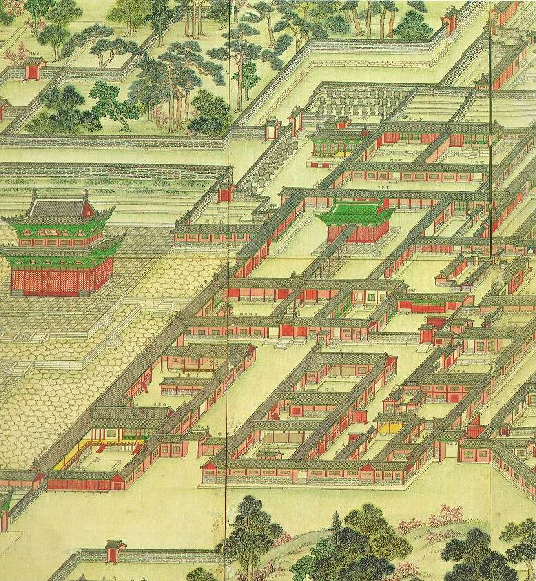 Donggweoldo (동궐도). 동궐도는 창덕궁과 창경궁을 조감도 형식으로 그린, 조선후기의 대표적인 궁궐 그림이다. 비단 바탕에 채색을 했고 가로576cm 세로 273cm이며 국보 제 249호로 지정되어 있다. 고려대학교 박물관에 소장되어 있다